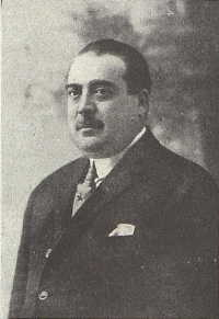 El pintor español Mariano Bertuchi, en El Financiero de Madrid